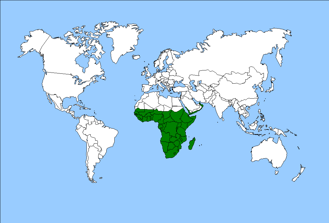 écozone afrotropicale avec les frontières nationales